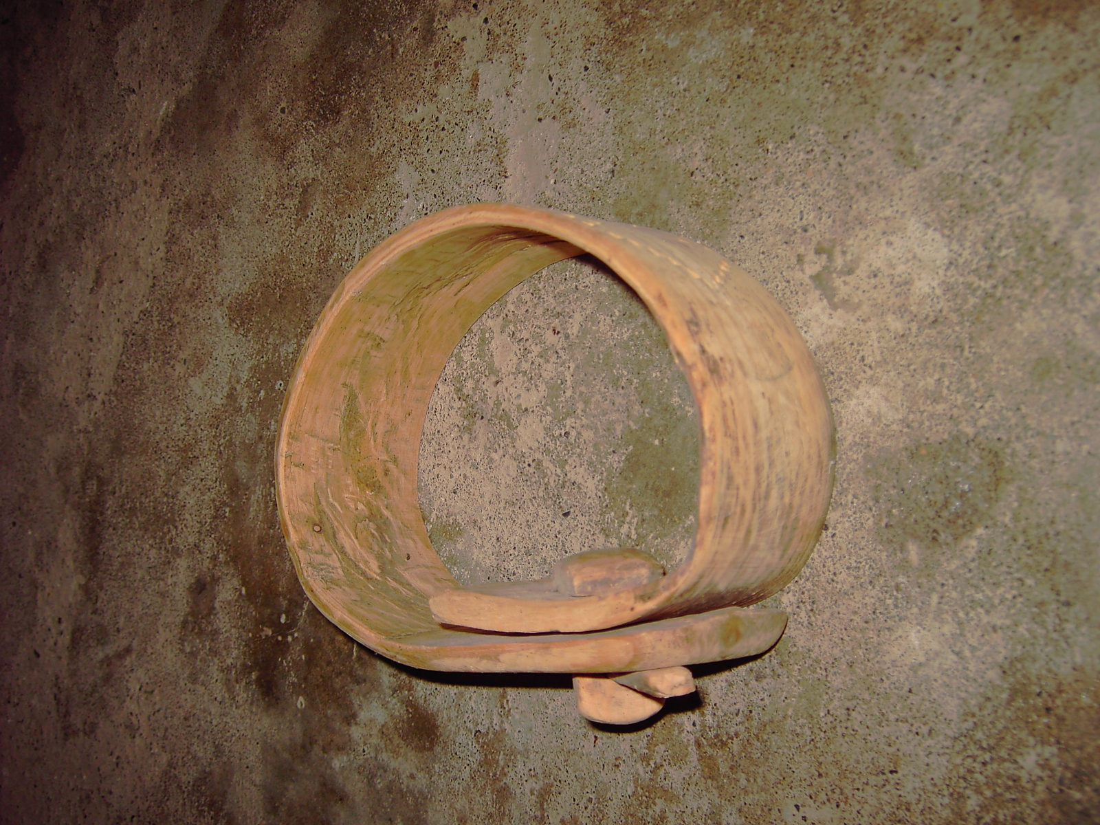 Canaula o canabla, que solía sujetar las esquiellas o cencerros al cuello del animal.